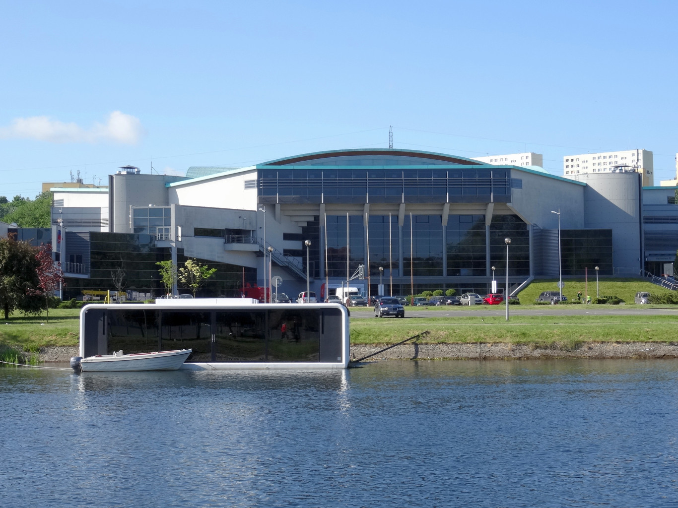 Dom na wodzie na Brdzie przed halą Łuczniczka w Bydgoszczy